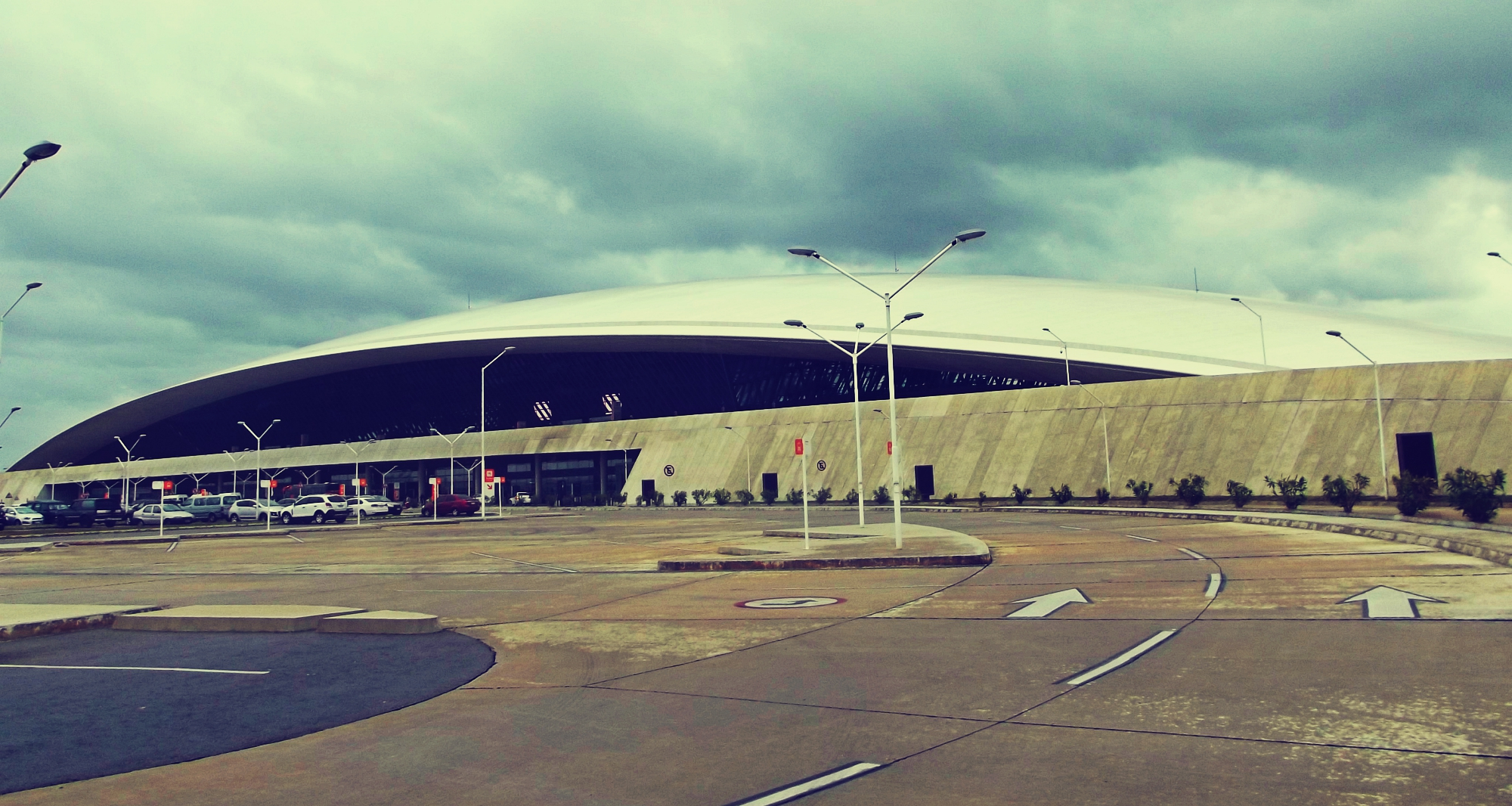 Aeropuerto Internacional de Carrasco. Ubicada en el departamento de Canelones